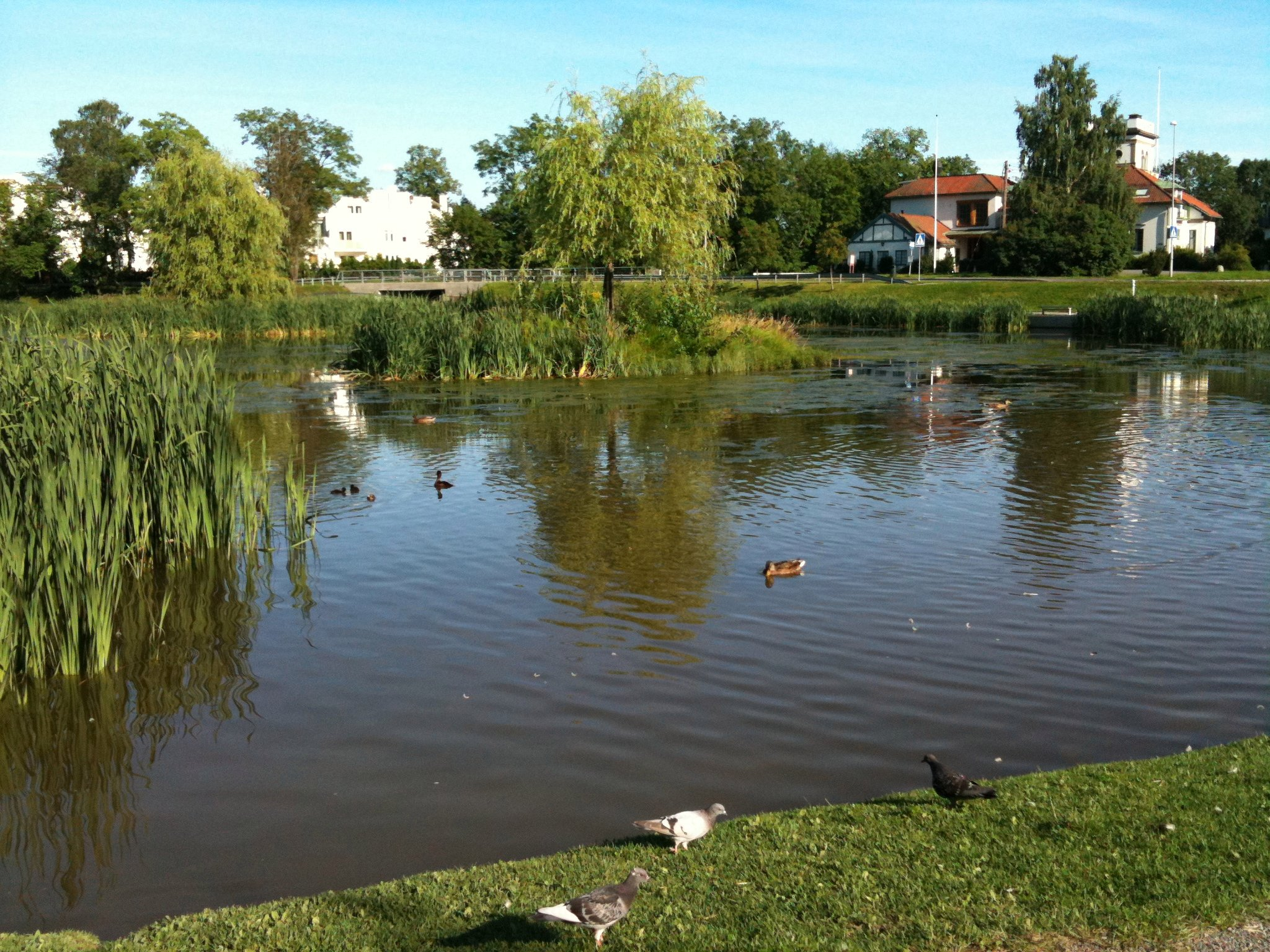 Øvre Smestaddammen in Smestad, Oslo, Norway